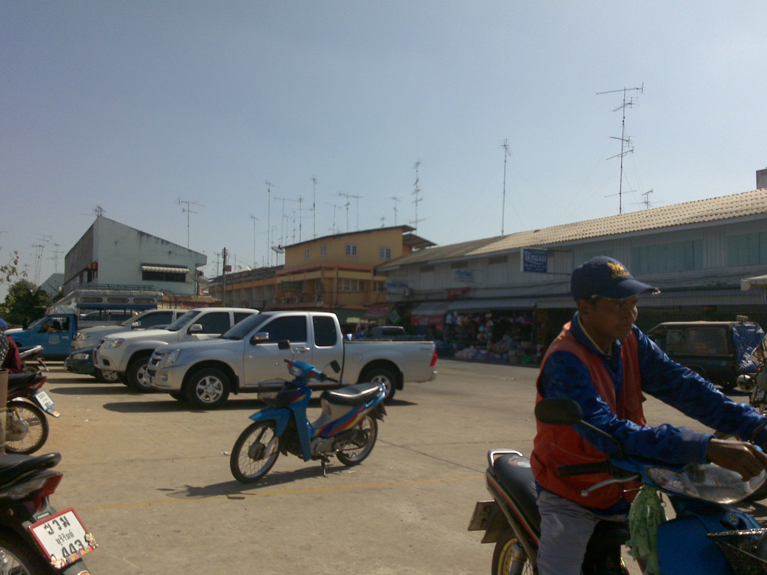 อำเภอลำปลายมาศ